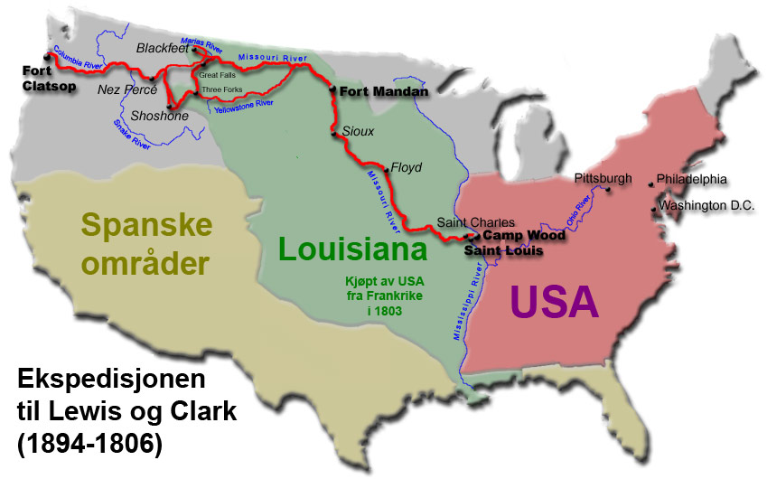 Kart over Lewis og Clarks ekspedisjon (Norwegian version)